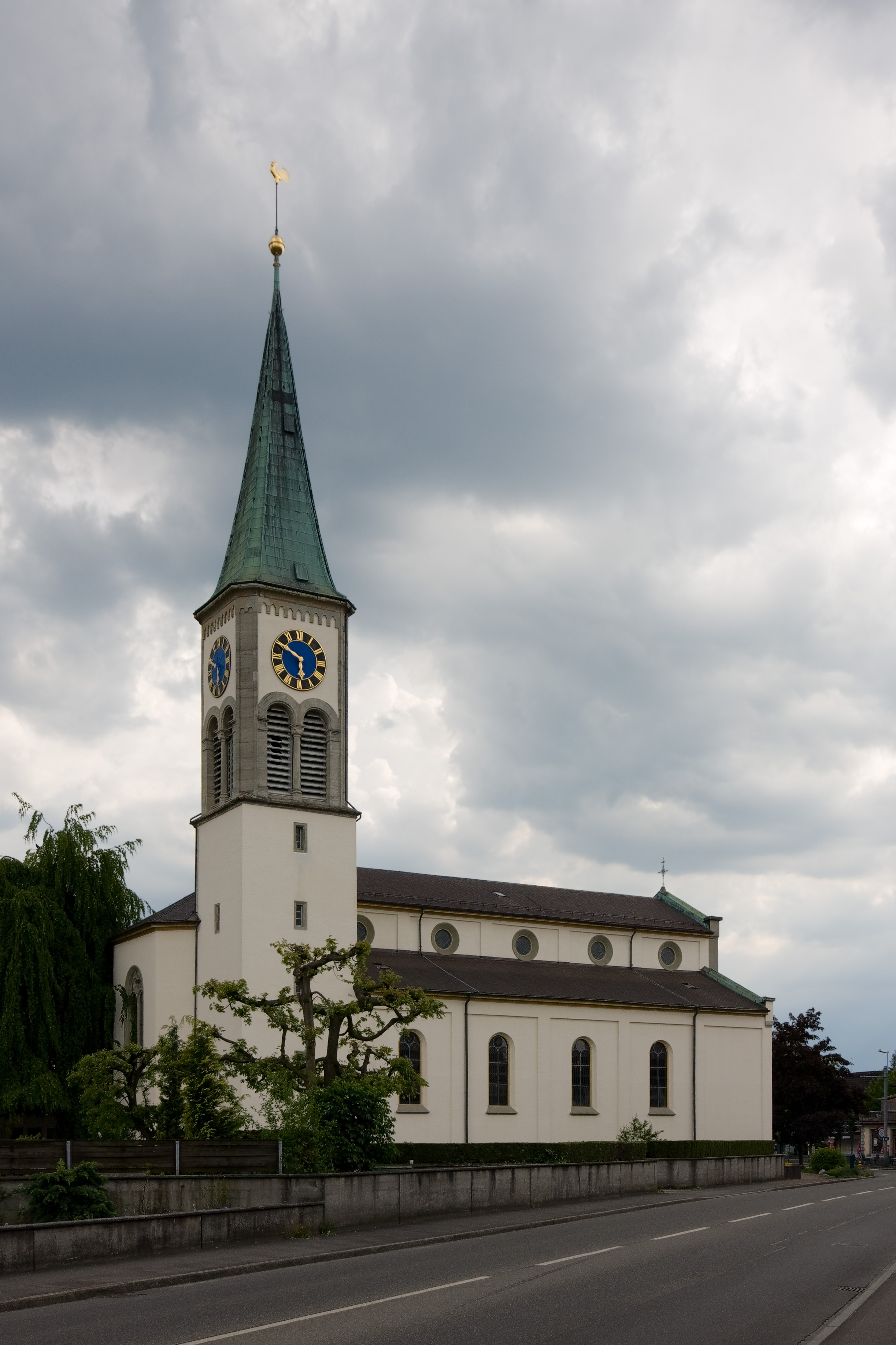 Die Kirche Oberentfelden von der Strasse gesehenArchitekt Ferdinand Stadler